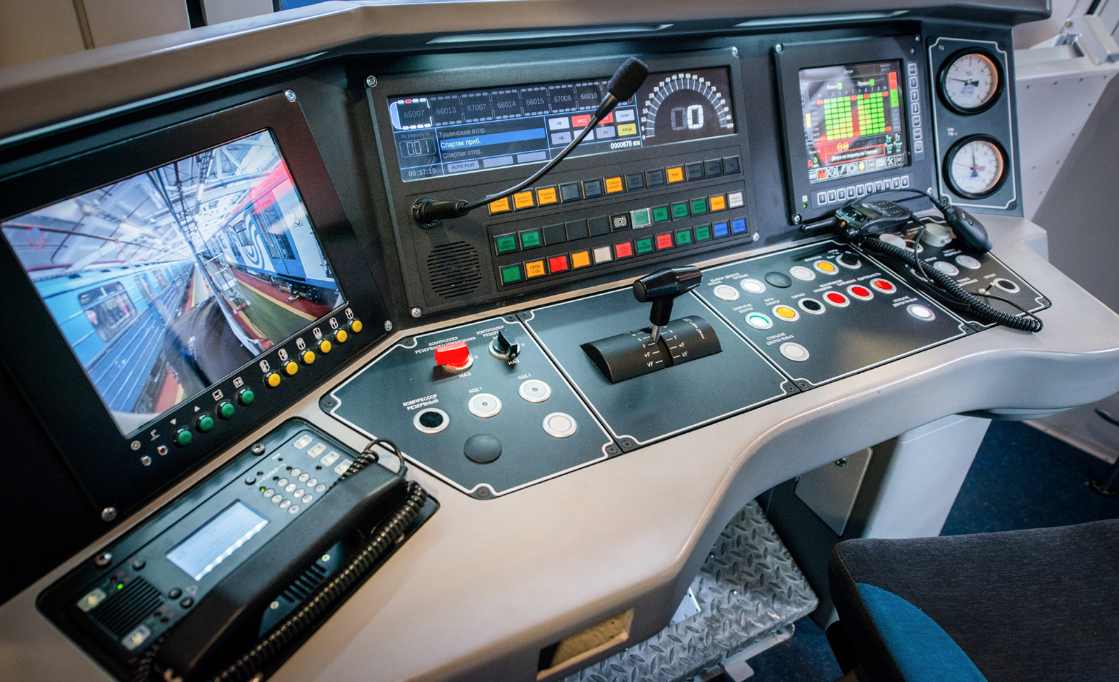 Пульт управления в кабине машиниста электропоезда метро 81-765/766/767 «Москва»